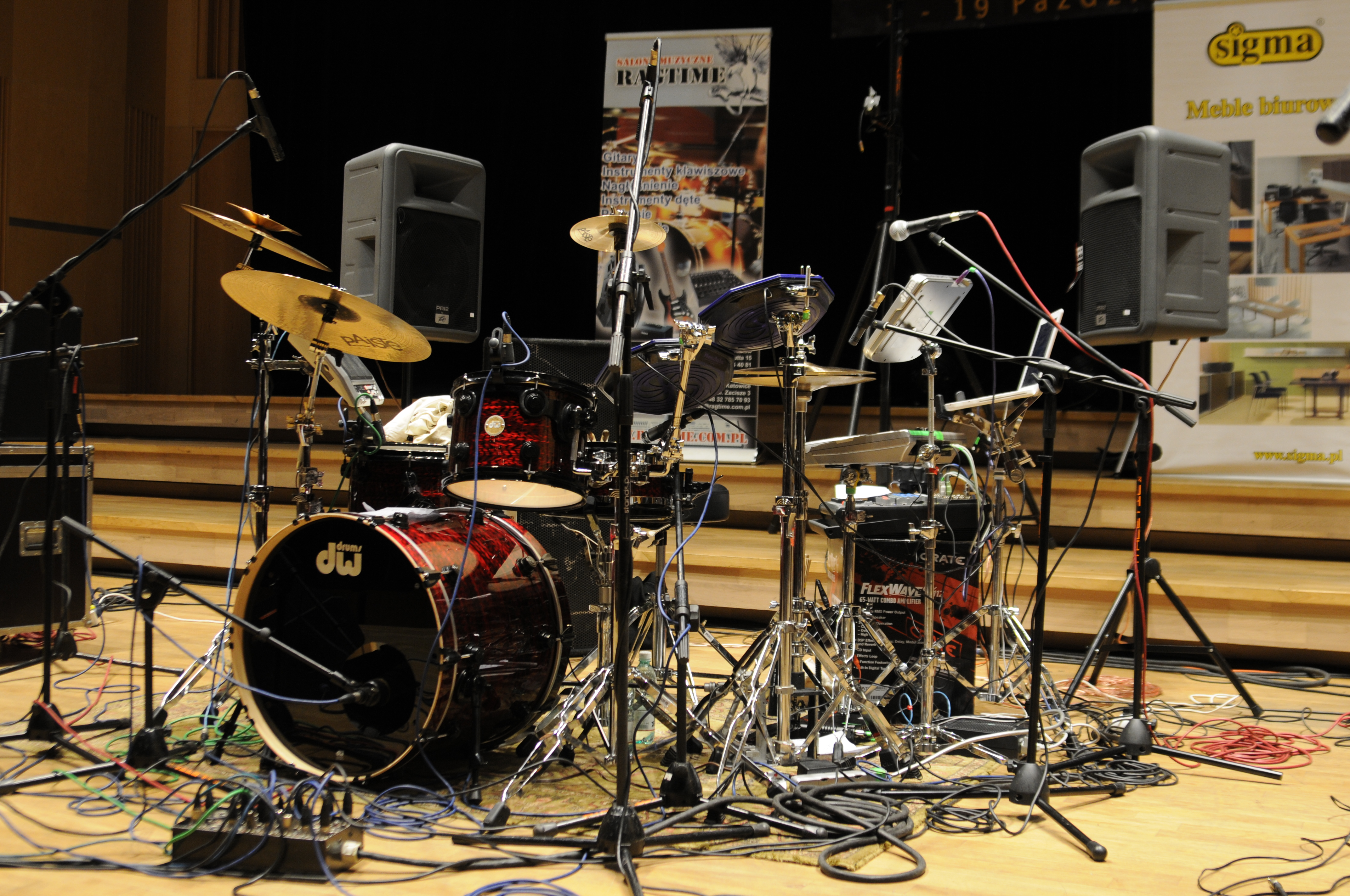 Pat's drums